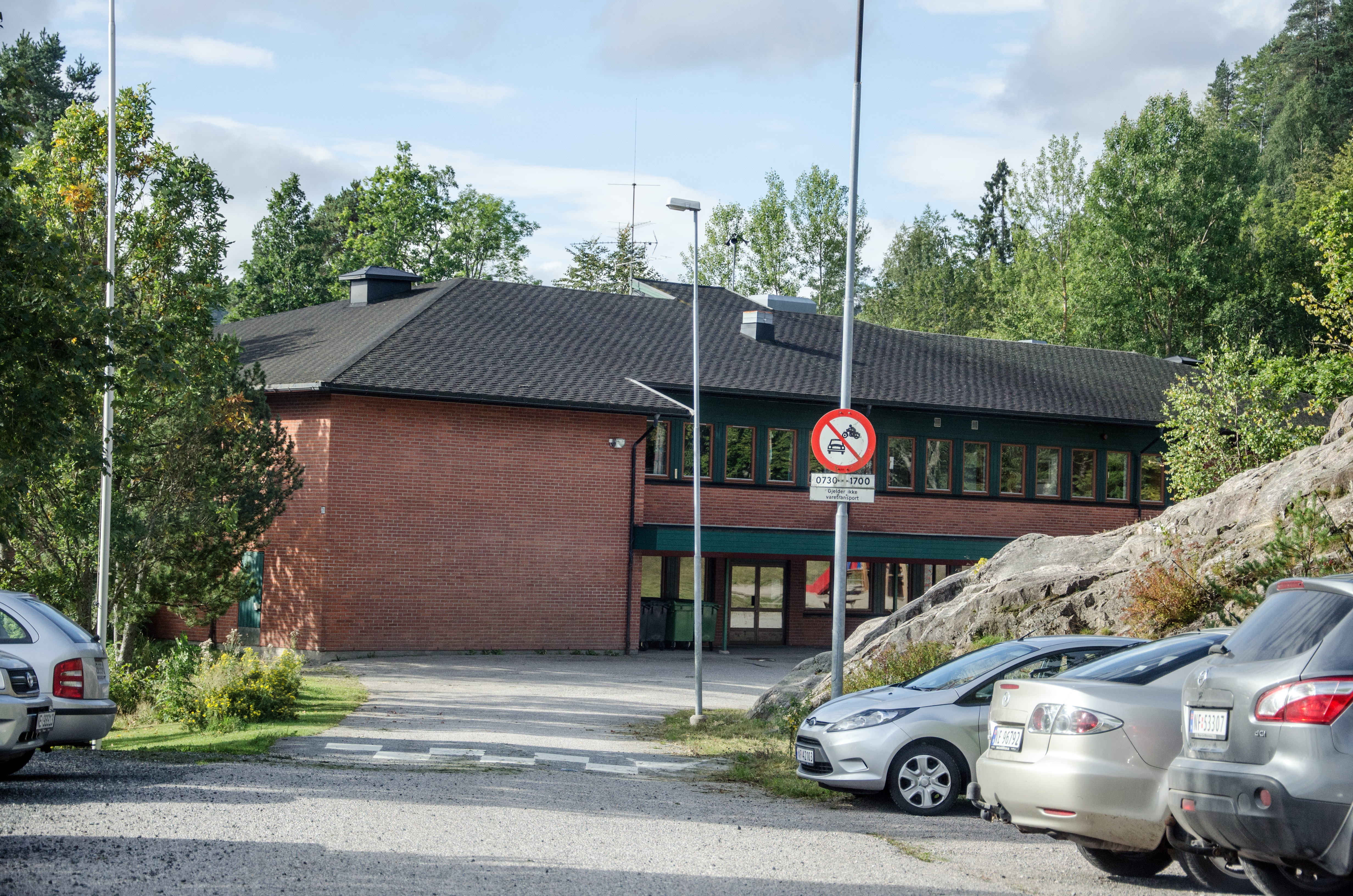 Svanvik skole, Porsgrunn